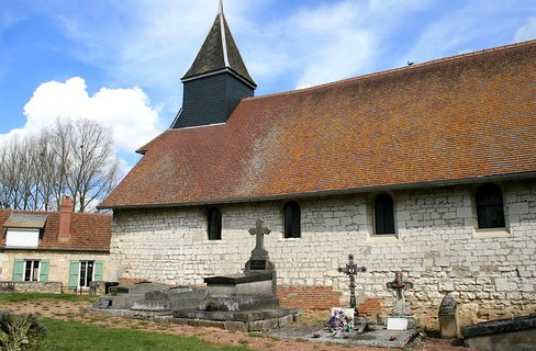 Eglise de Rémécourt